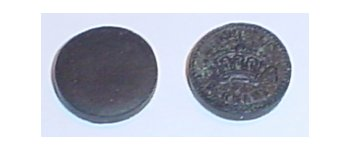 Waescheblautabletten aus dem Jahre 1950. 1 Vorder- und 1 Rueckseite. Stempelung: Krone mit Bändern und Aufdruck "Made in Germany" Masse: 17 mm Dia, 3 mm dick, 1.5 gr